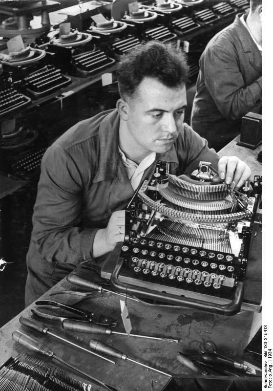 Chemnitz, Schreibmaschinenfabrik Scherl Bilderdienst Wanderer Werk in Chemnitz. Die Schreibmaschine "Silencia". Letzte Überprüfung seitens der Feinmechaniker in der Montage. 47319/34